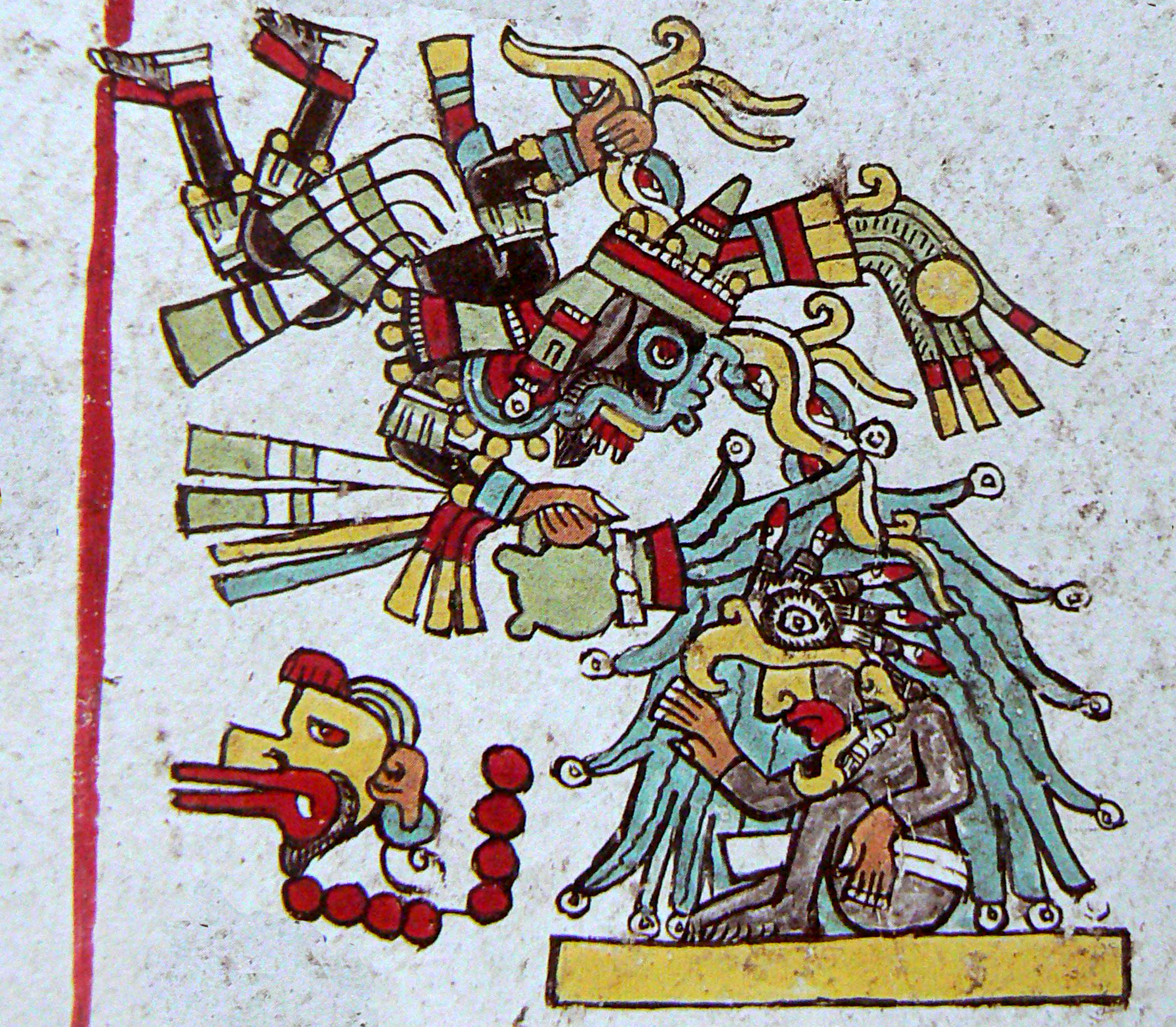 repr esentación de Dzahui en el códice vindobonensis